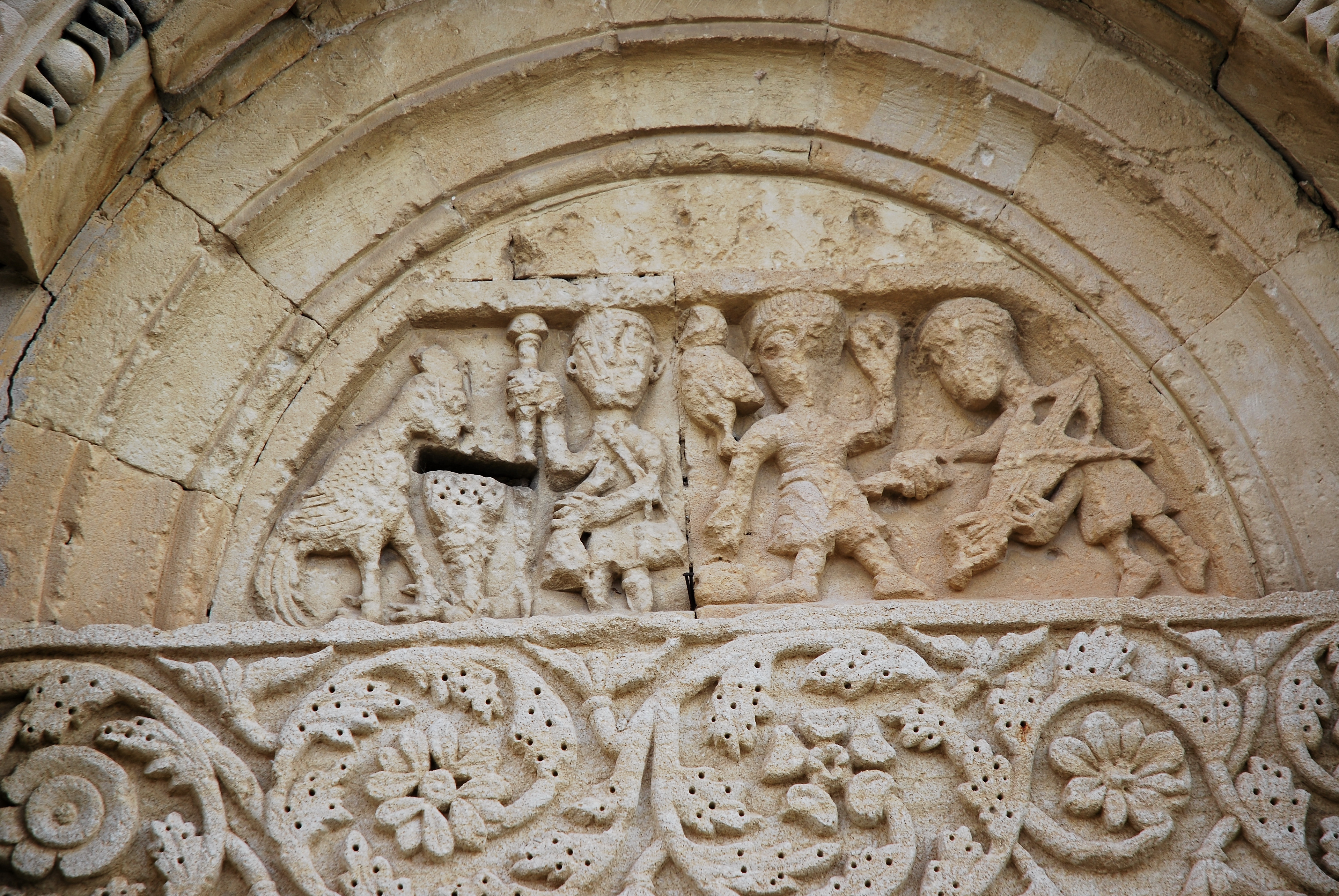 Sainte-Jalle (Drôme, France). Sainte-Jalle (Drôme, France). Église Notre-Dame de Beauver, détail de la fries et du tympan.